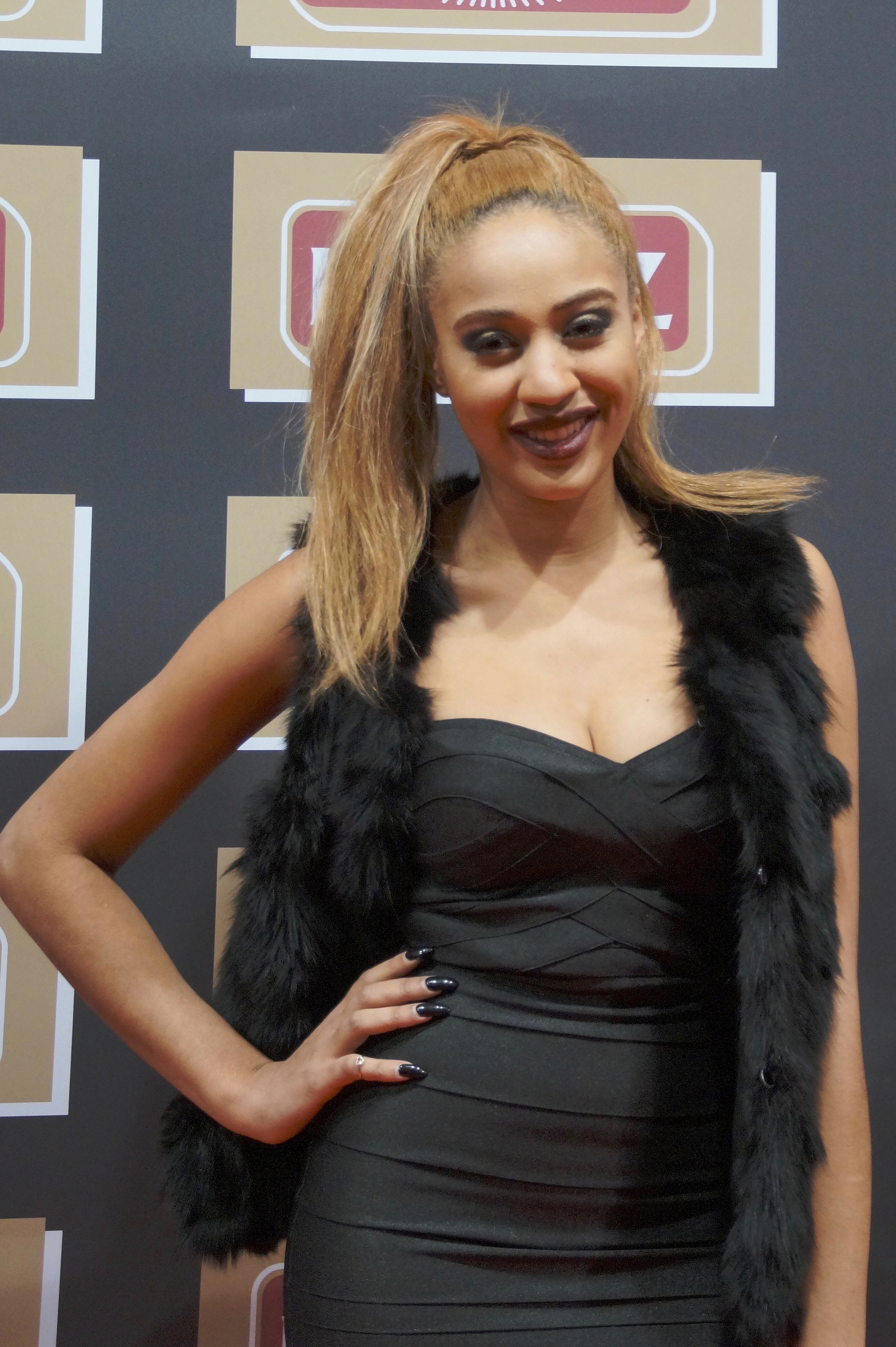 Sarah Joelle Jahnel bei der Lambertz Monday Night, im Februar 2016.